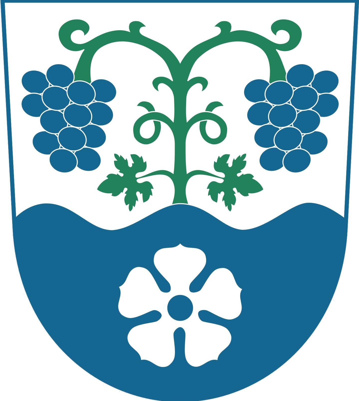 Znak obce Kly